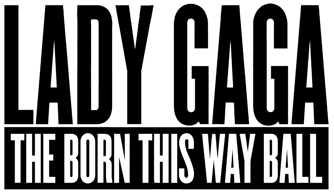 Logo del Born this Way Ball Tour